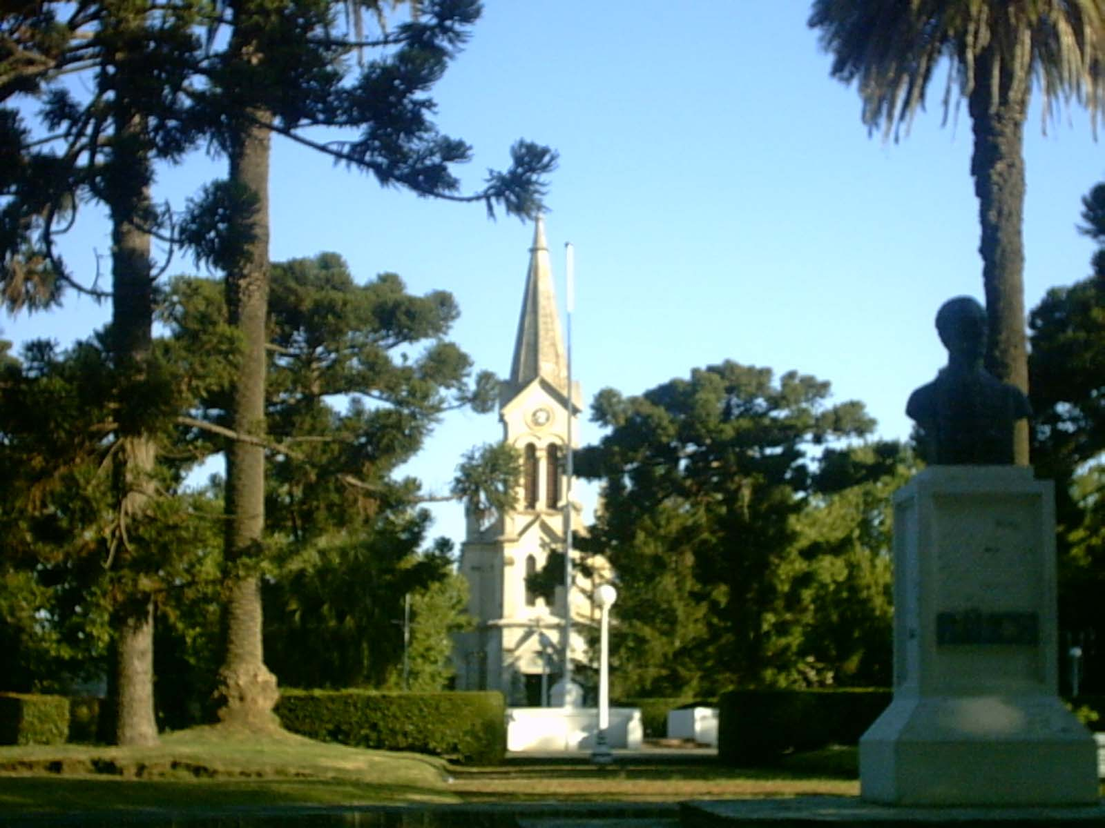 Iglesia de la ciudad de Rauch